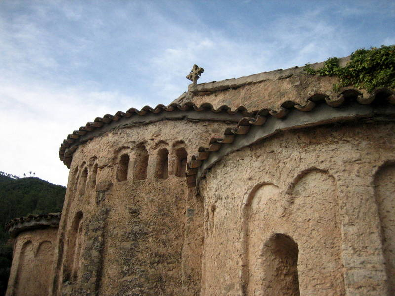 Absis església Coaner a Sant Mateu de Bages - Catalunya